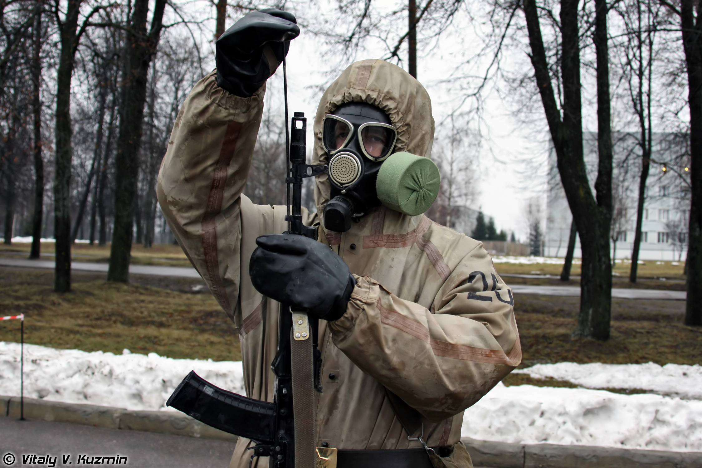 Занятия с ротой РХБ защиты (Exercises with CBRN Protection Company)